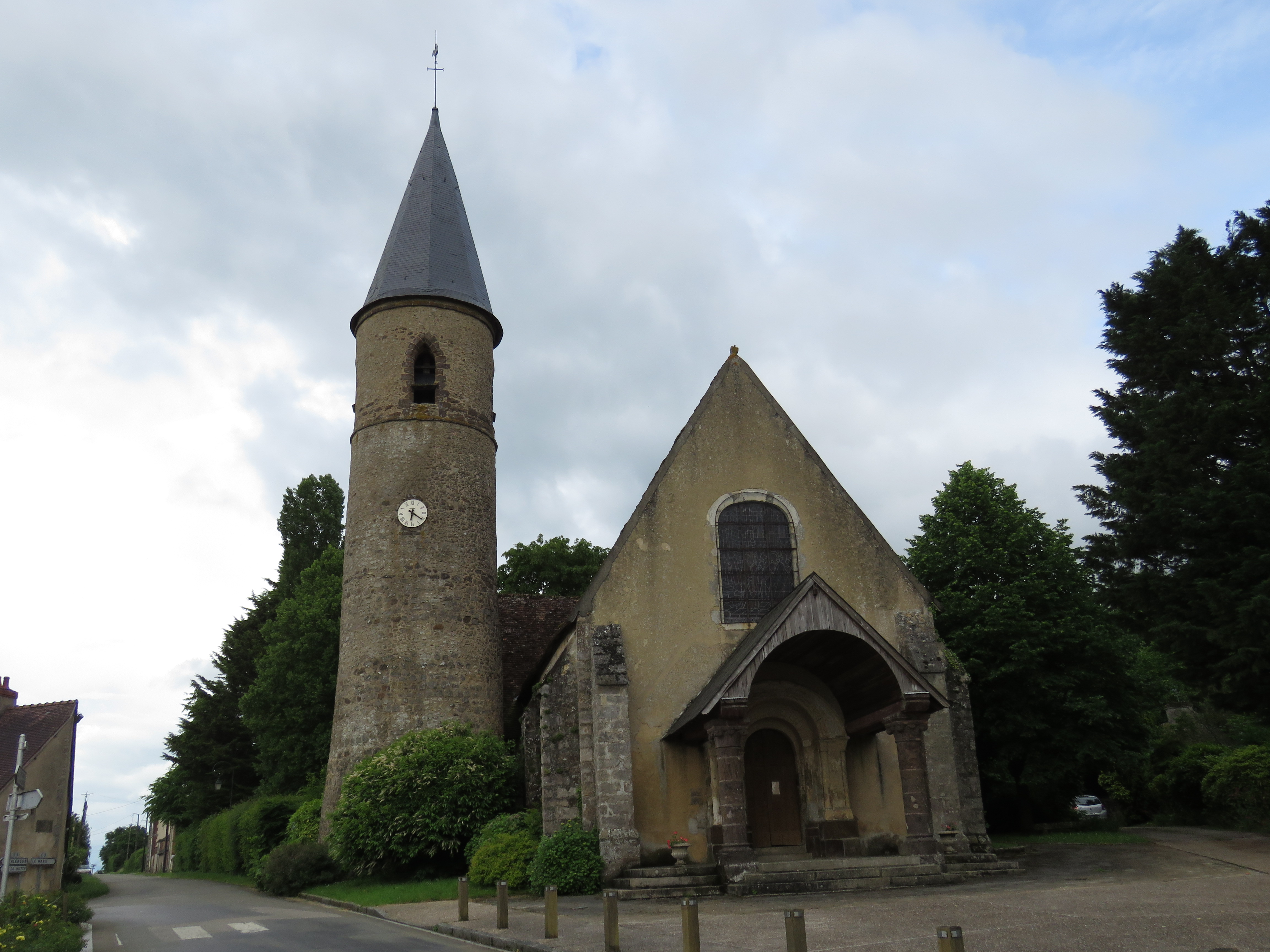 église